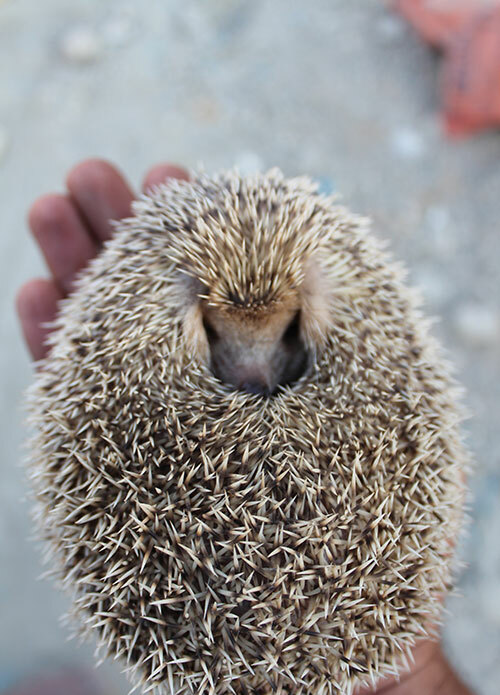 جوجه تیغی در مناطق مرکزی شهر تهران - خیابان شریعتی - پل سید خندان